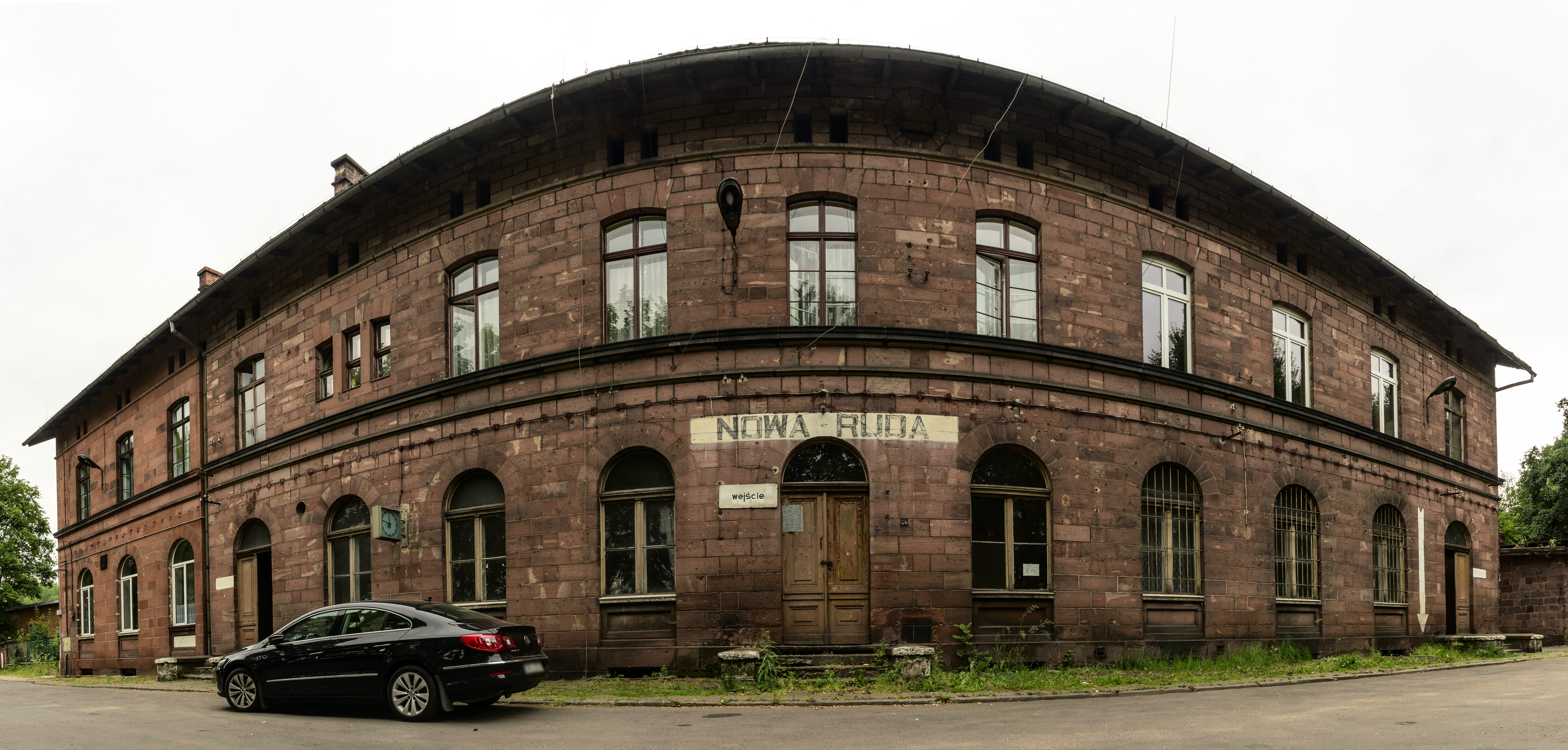 Dworzec w Nowej Rudzie This photo of Lower Silesian Voivodeship was taken during Wikiexpedition 2013 set up by Wikimedia Polska Association. You can see all photographs in category Wikiekspedycja 2013.